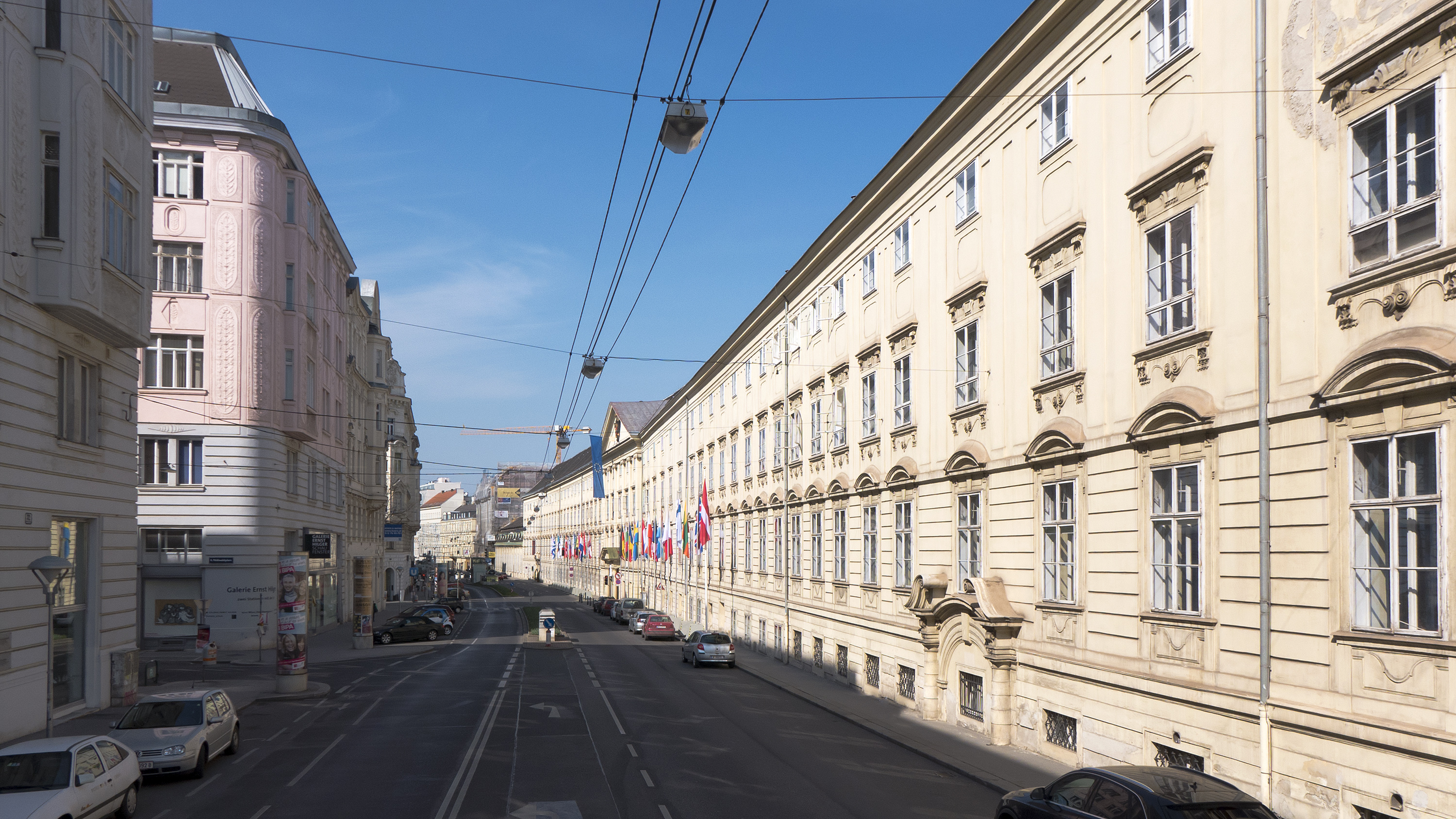 Favoritenstraße in Wien 4 bei Nr. 34 Richtung Norden